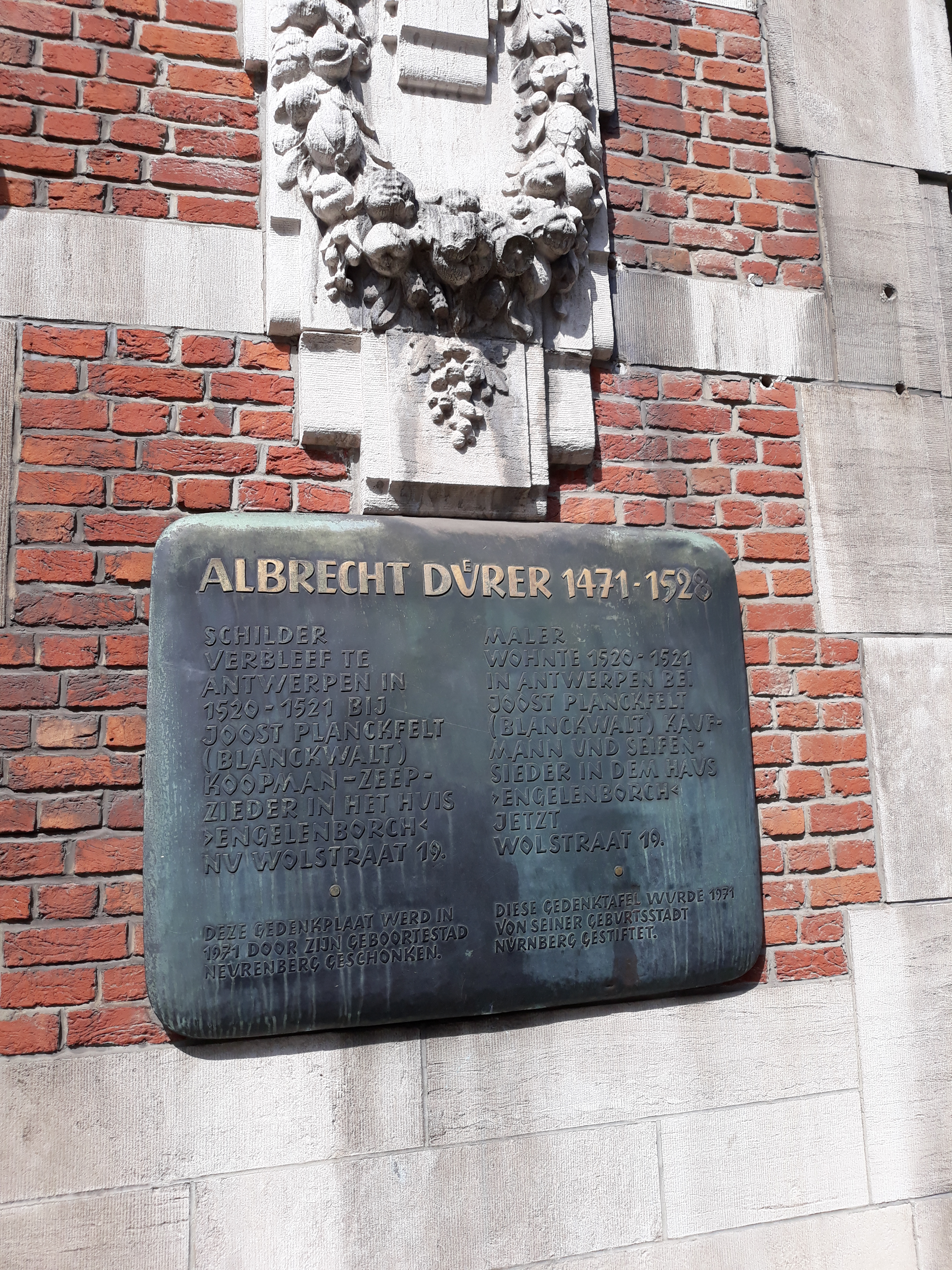 Gedenktafel für den deutschen Maler Albrecht Dürer in Antwerpen (zweisprachig).